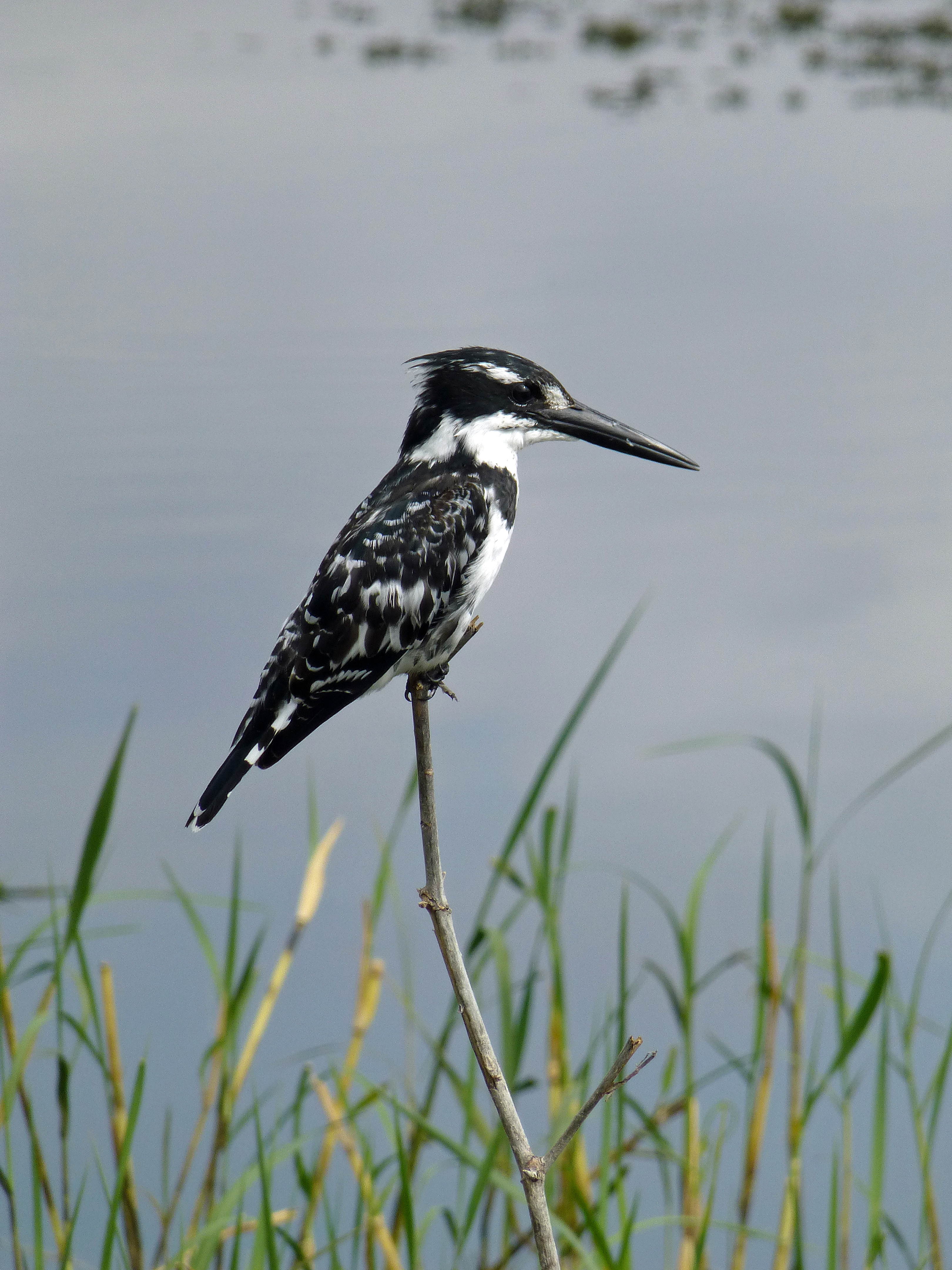 Martin-pêcheur pie (Ceryle rudis) sur le lac Haïk (Ethiopie)